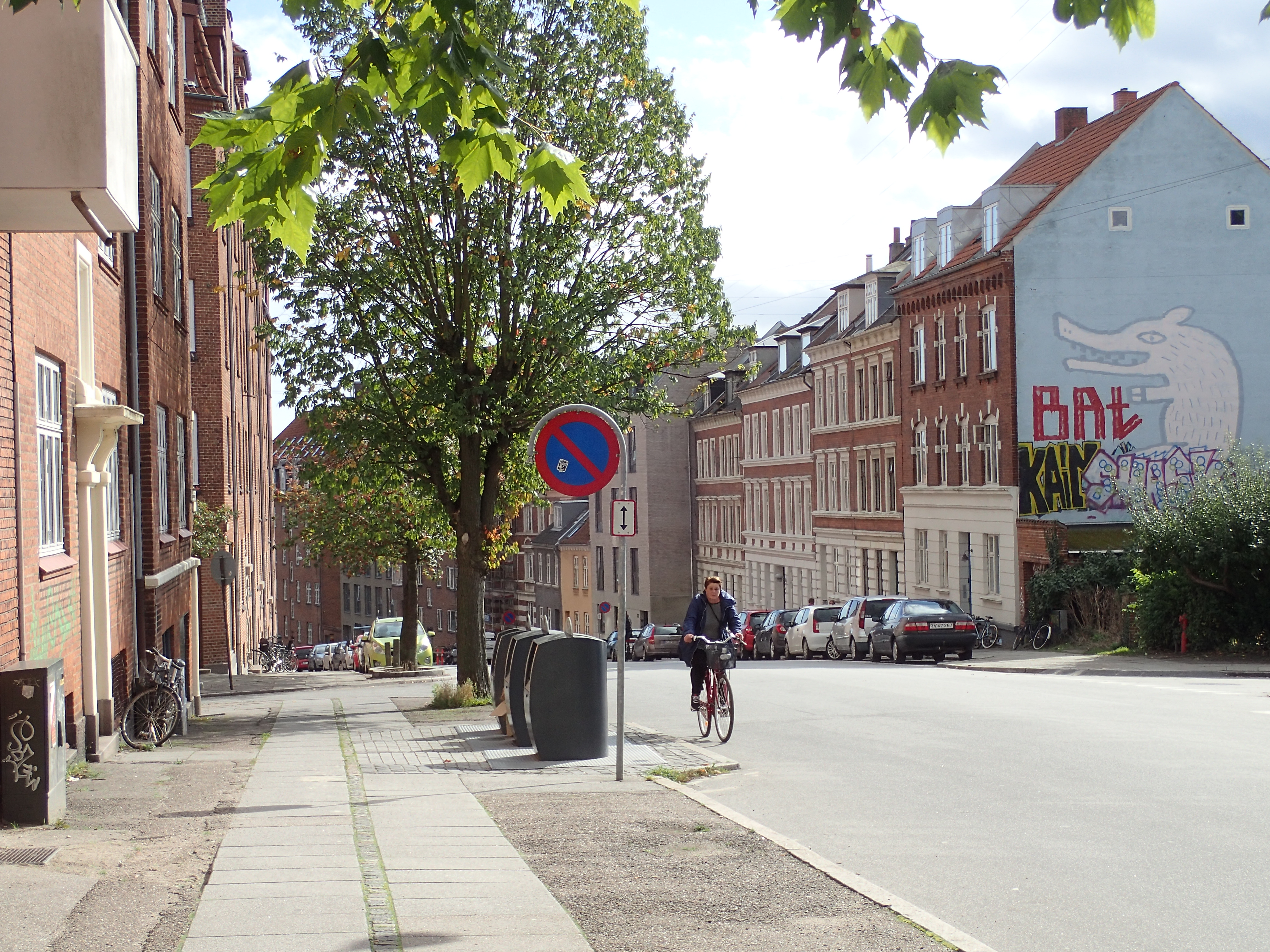 Den sydlige ende af Langelandsgade i Aarhus.